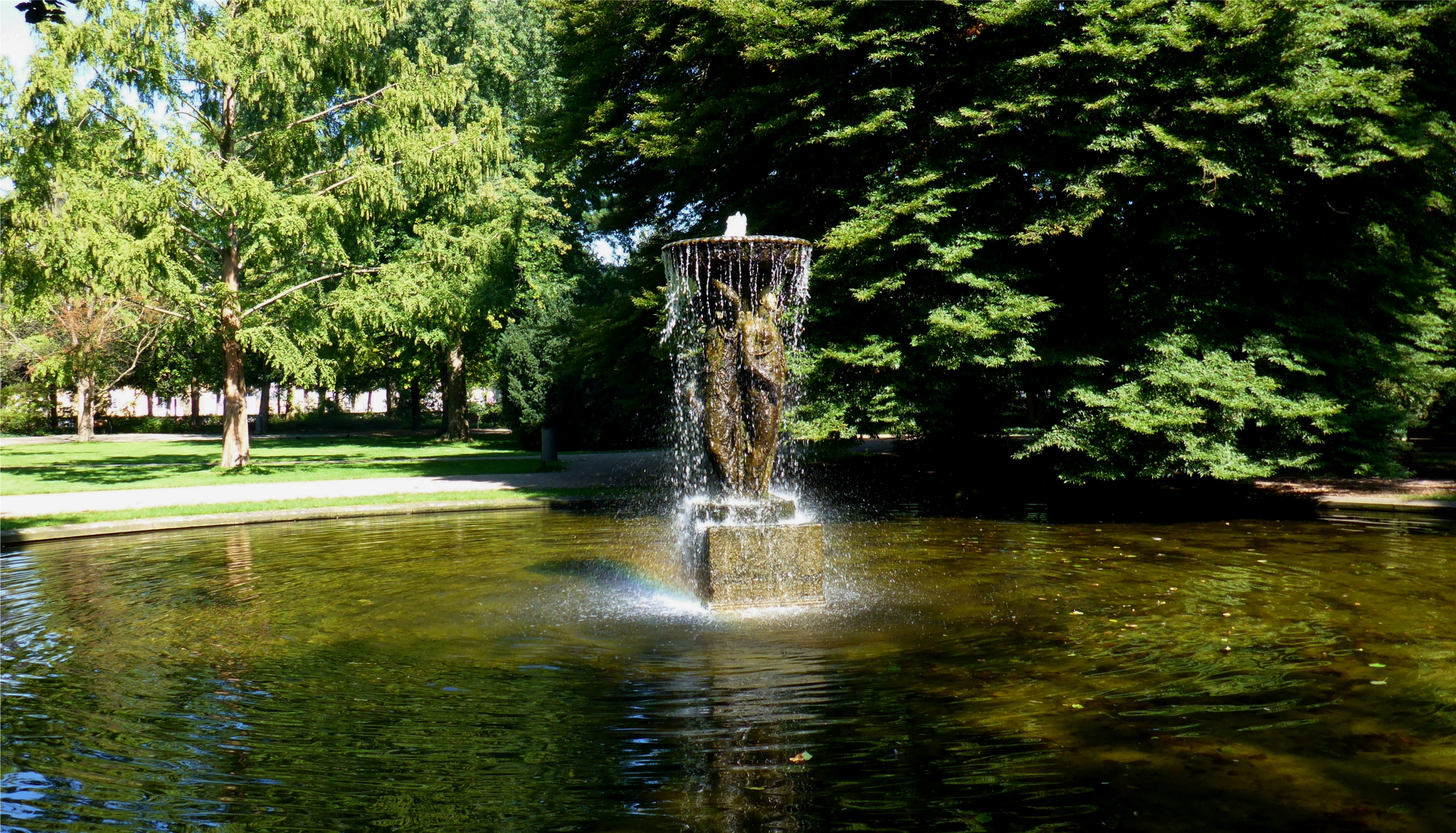 Der Schlossplatz in Karlsruhe